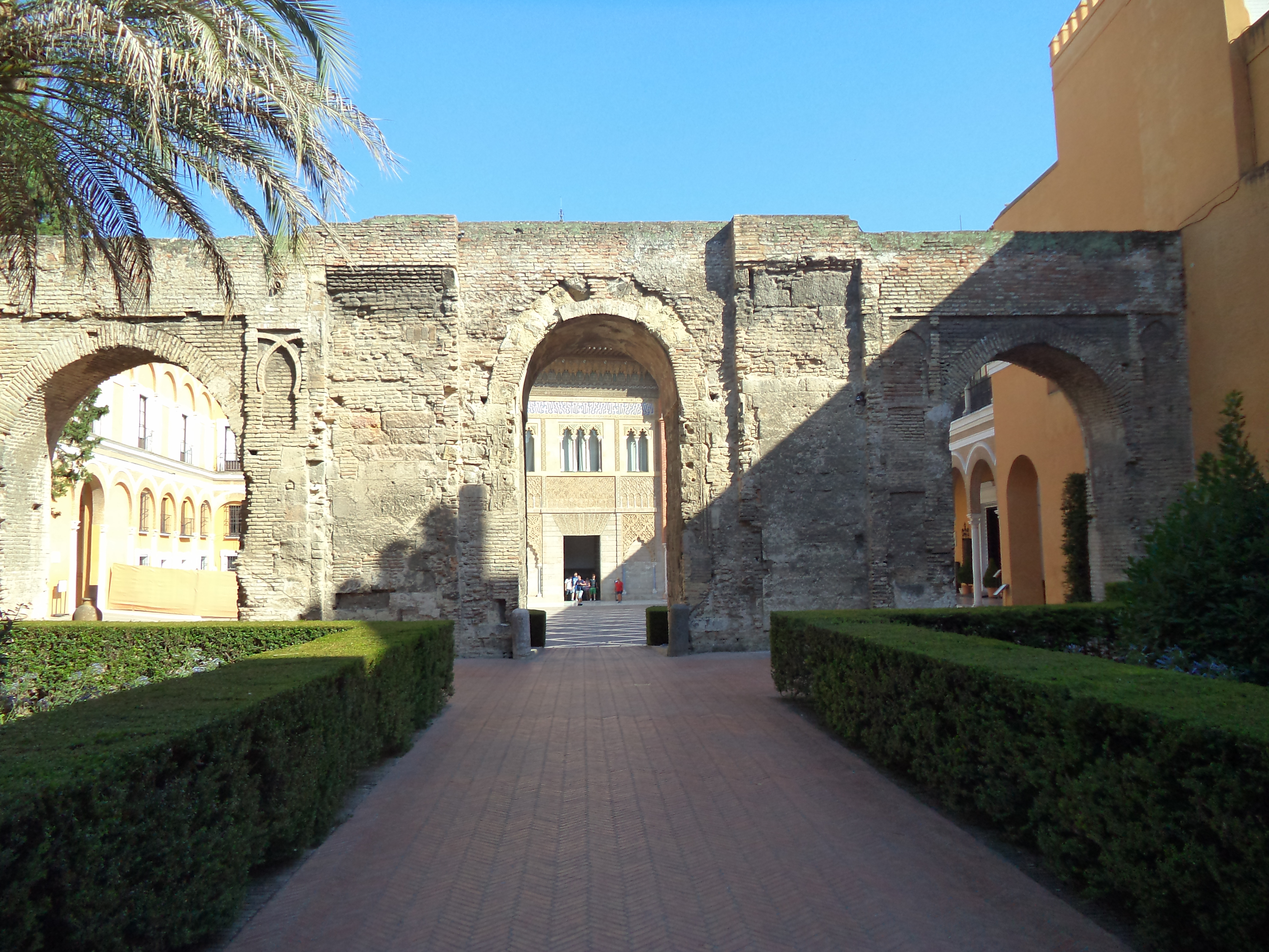 Arcos almohades que separan el Patio del León del Patio de la Montería